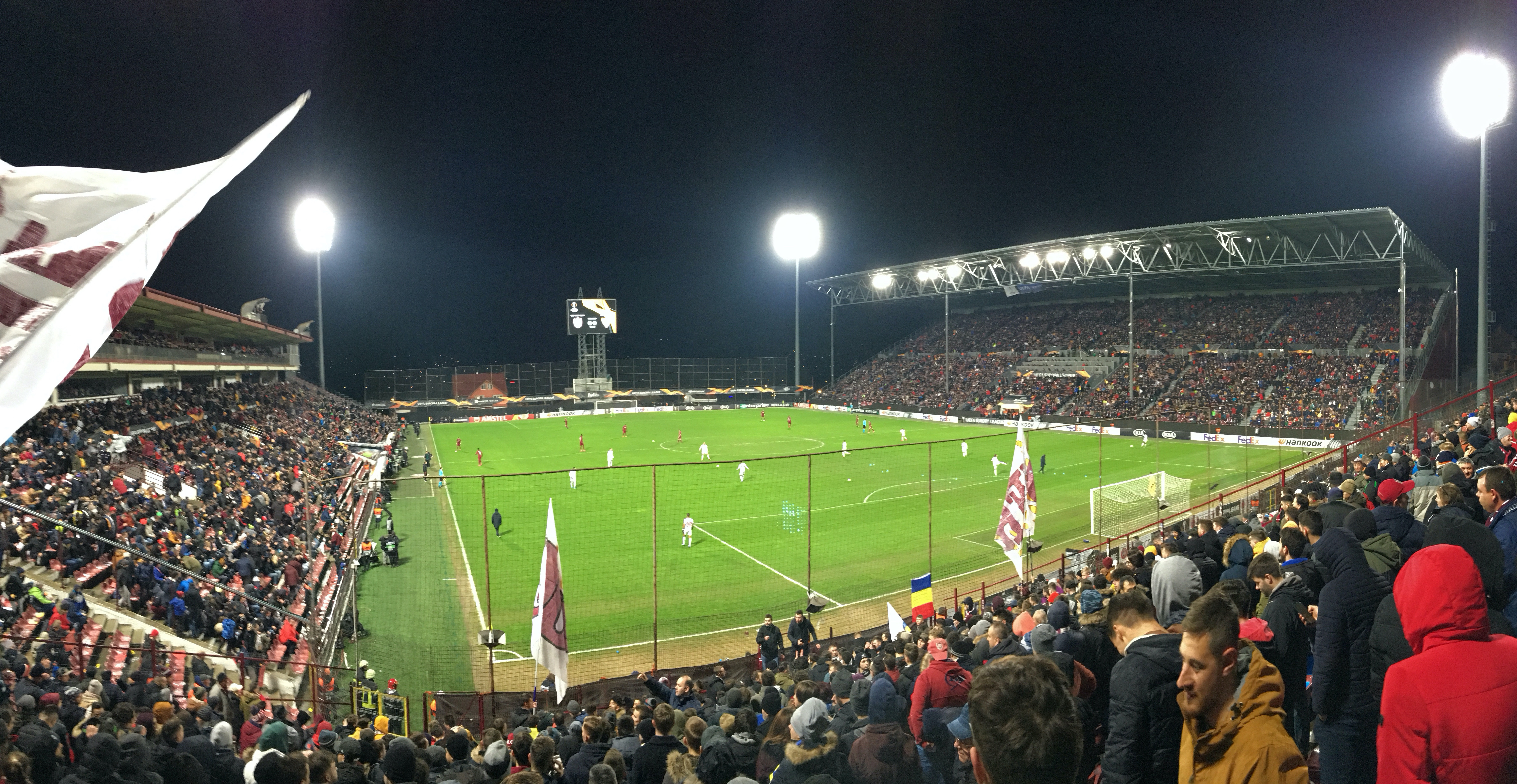 Stadion Dr. Constantin Rădulescu la meciul CFR Cluj - FC Sevilla (1-1)